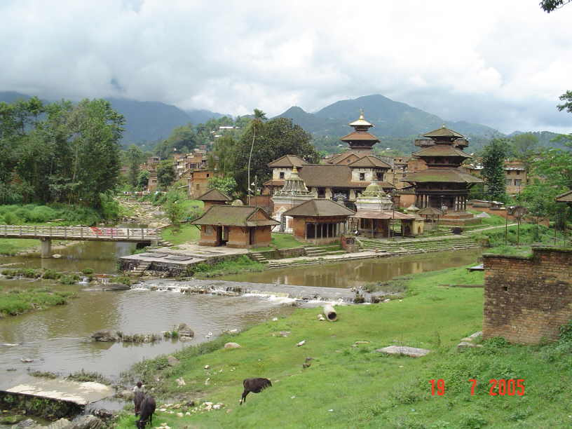 Город Панаути в Непале